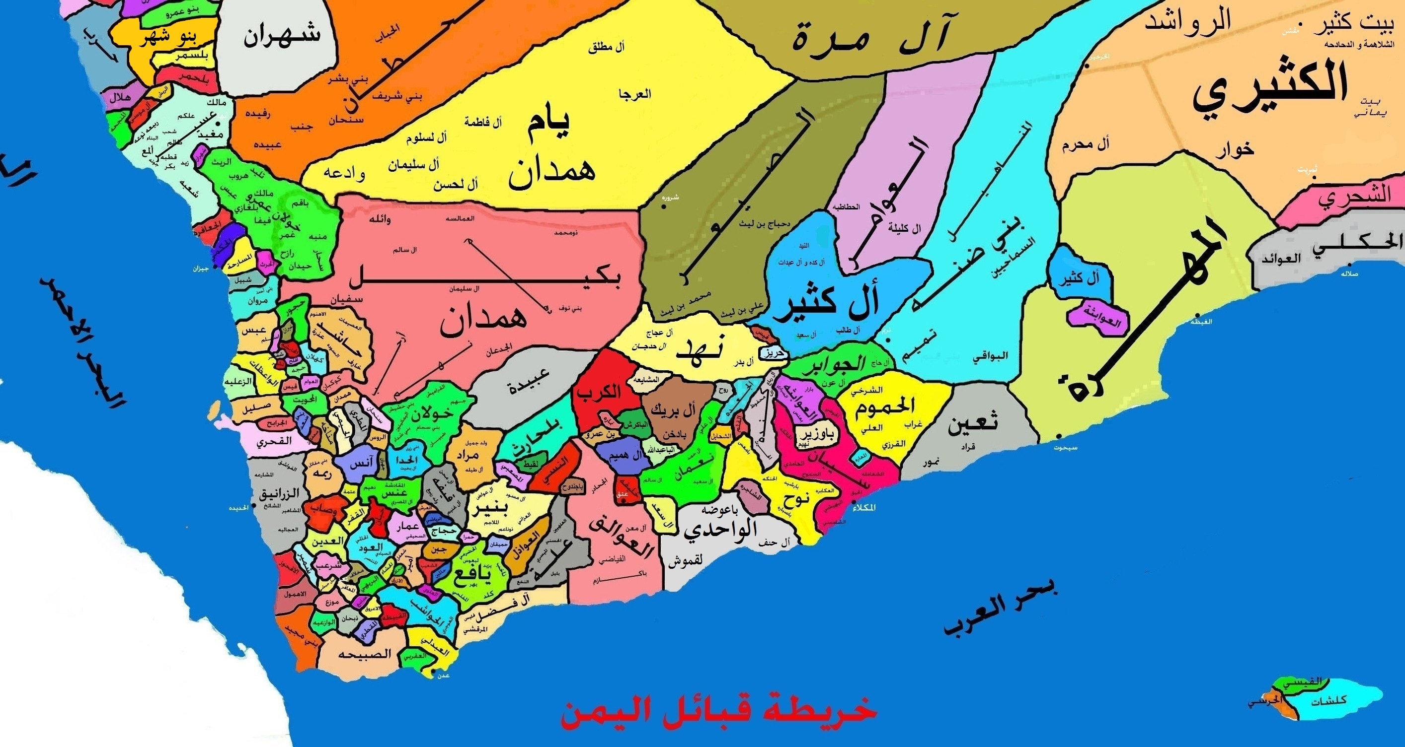 خريطة قبائل اليمن و خريطة خريطة غير حقيقية ومضللة